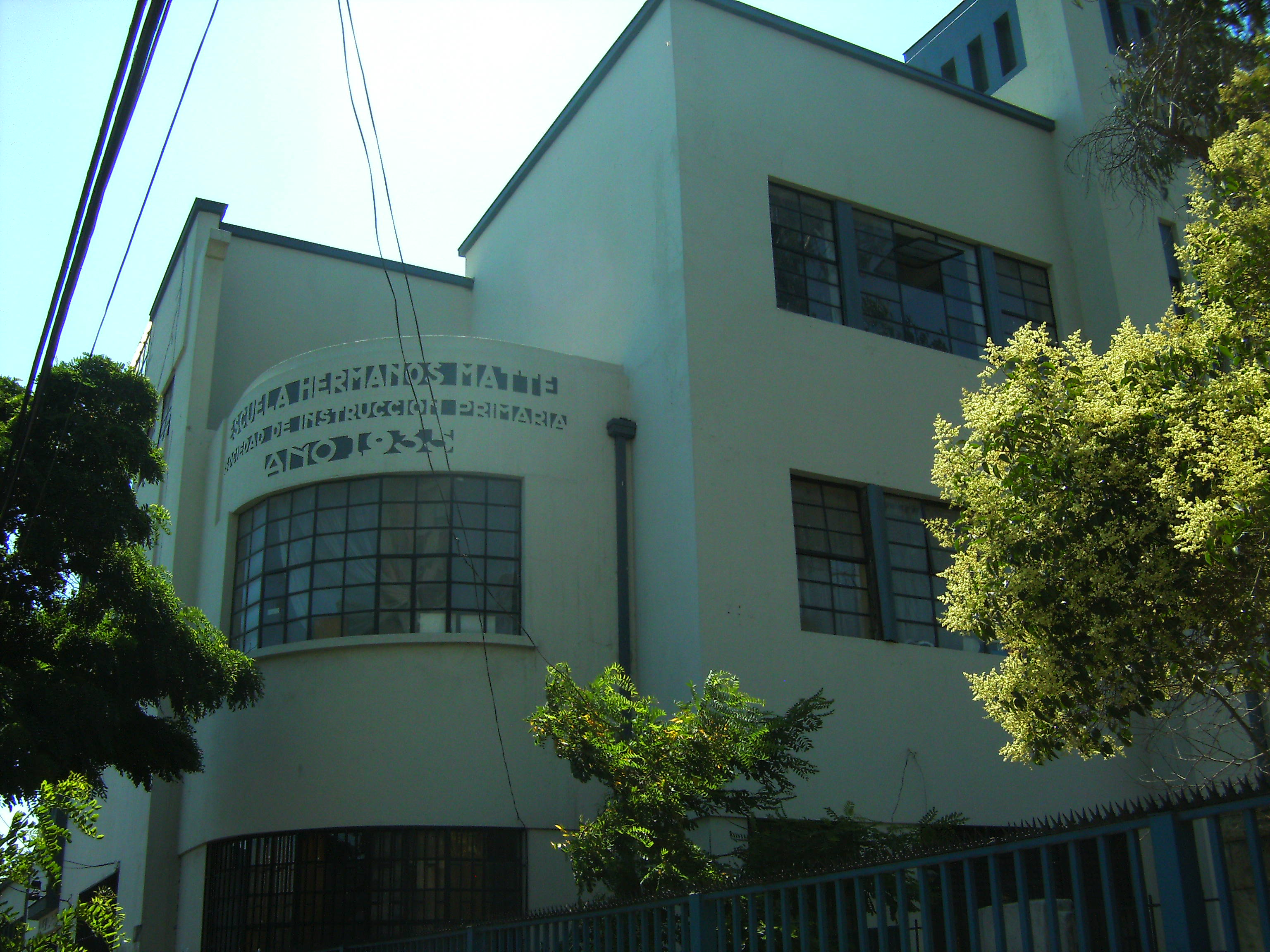 Edificio de la Sociedad de Instrucción Primaria o antiguas Escuelas Matte